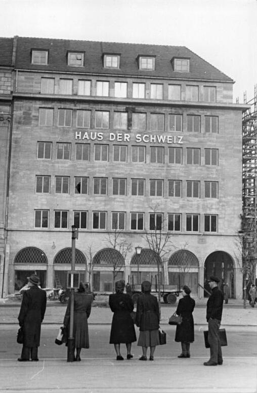 Berlin, "Haus der Schweiz" Illus Rudolph 8.12.50 Berlin 1950. UBz: Ein Teil der Gerüste am Haus der Schweiz sind gefallen. Das durch den Krieg beschädigte Gebäude wurde wieder ausgebaut.